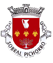 brasao da Aldeia de sobral pichorro. Descriçao feita pelo presidenta da junta de freguesia: três Folhas de vigna representando a importante produçao vinicola da aldeia uma oliveira para os numerosos olivais Um pichorro (sendo a lenda que de um pichorro quebrado por espagnois ,assim nasceu o Nome da aldeia) A core vermelha do mosto